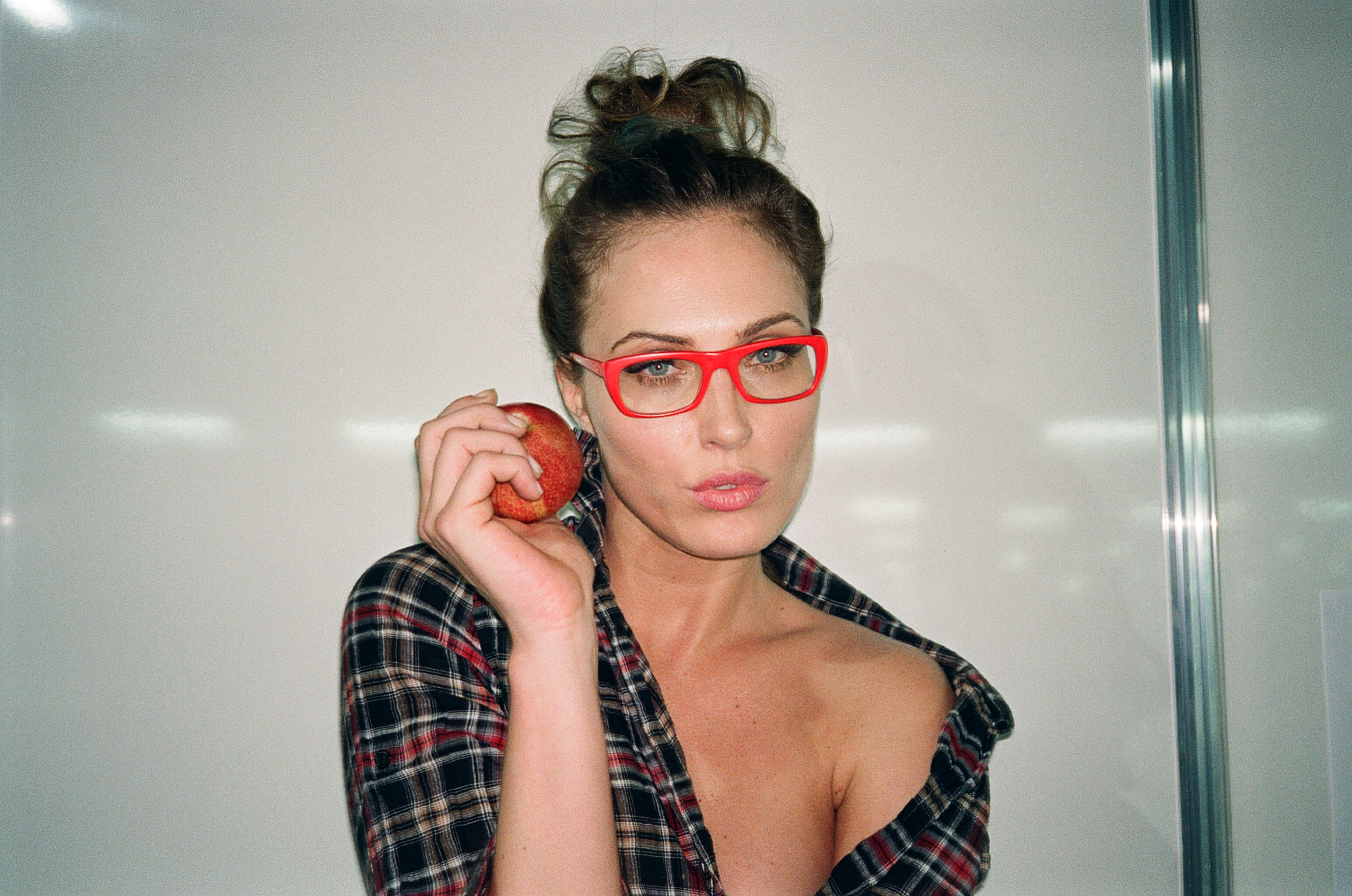 feat. Eliza Joenck